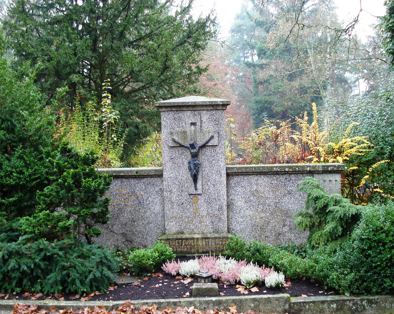 Grabstätte von August Ruf und zwei weiteren Singener Stadtpfarrern auf dem Waldfriedhof Singen/Hohentwiel